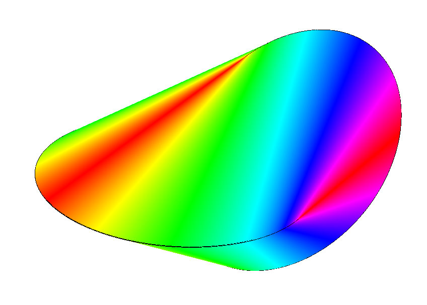 Parametrisierung des Oloids